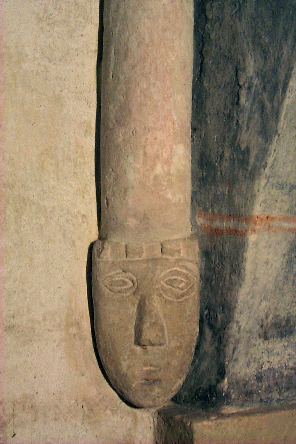 Den medeltida kyrkan i Stora Hammar, Skåne, Sverige.